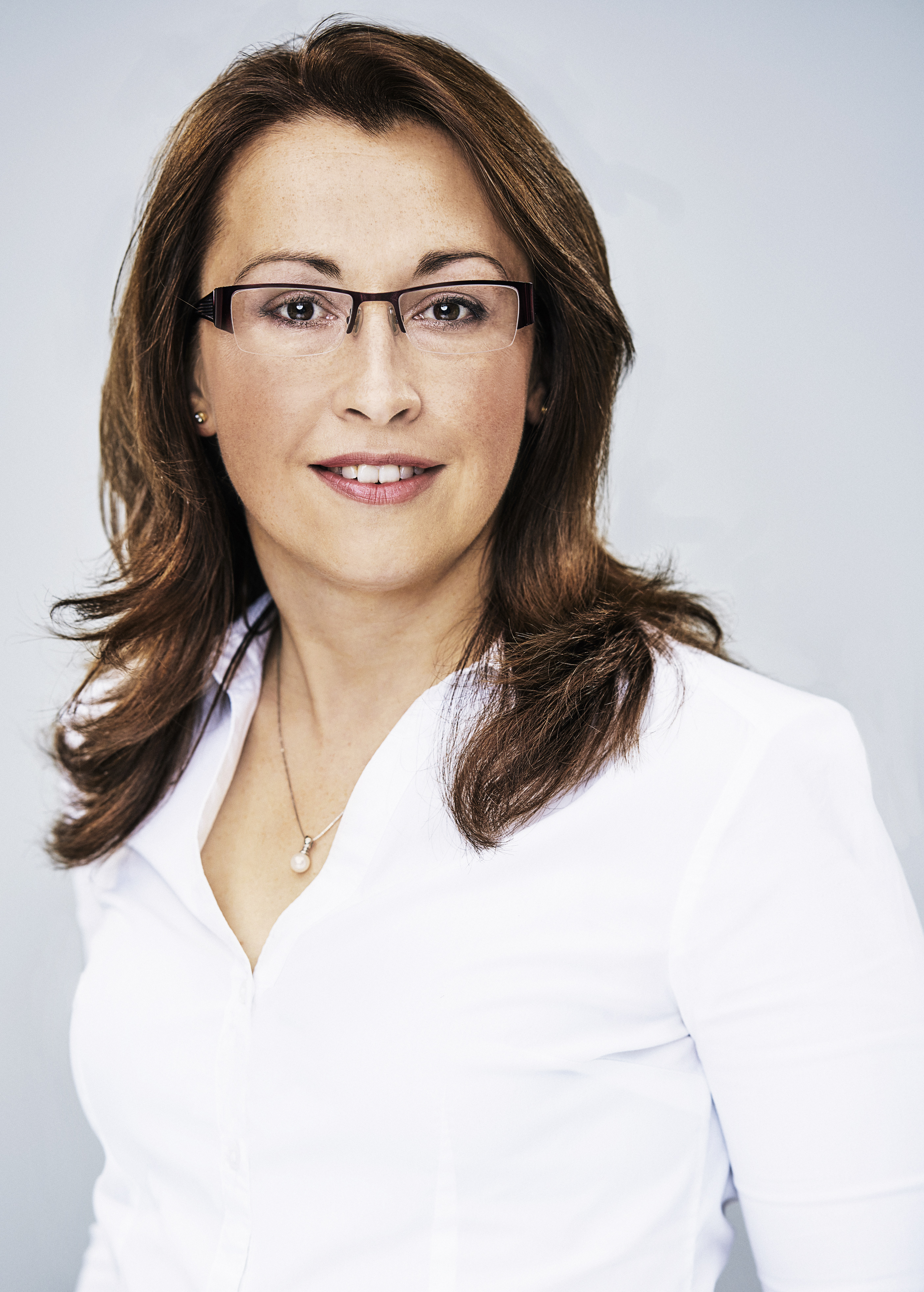 Ivana Cabrnochová, senátorka Parlamentu ČR za obvod 22 (Praha 10, Dubeč, Štěrboholy)